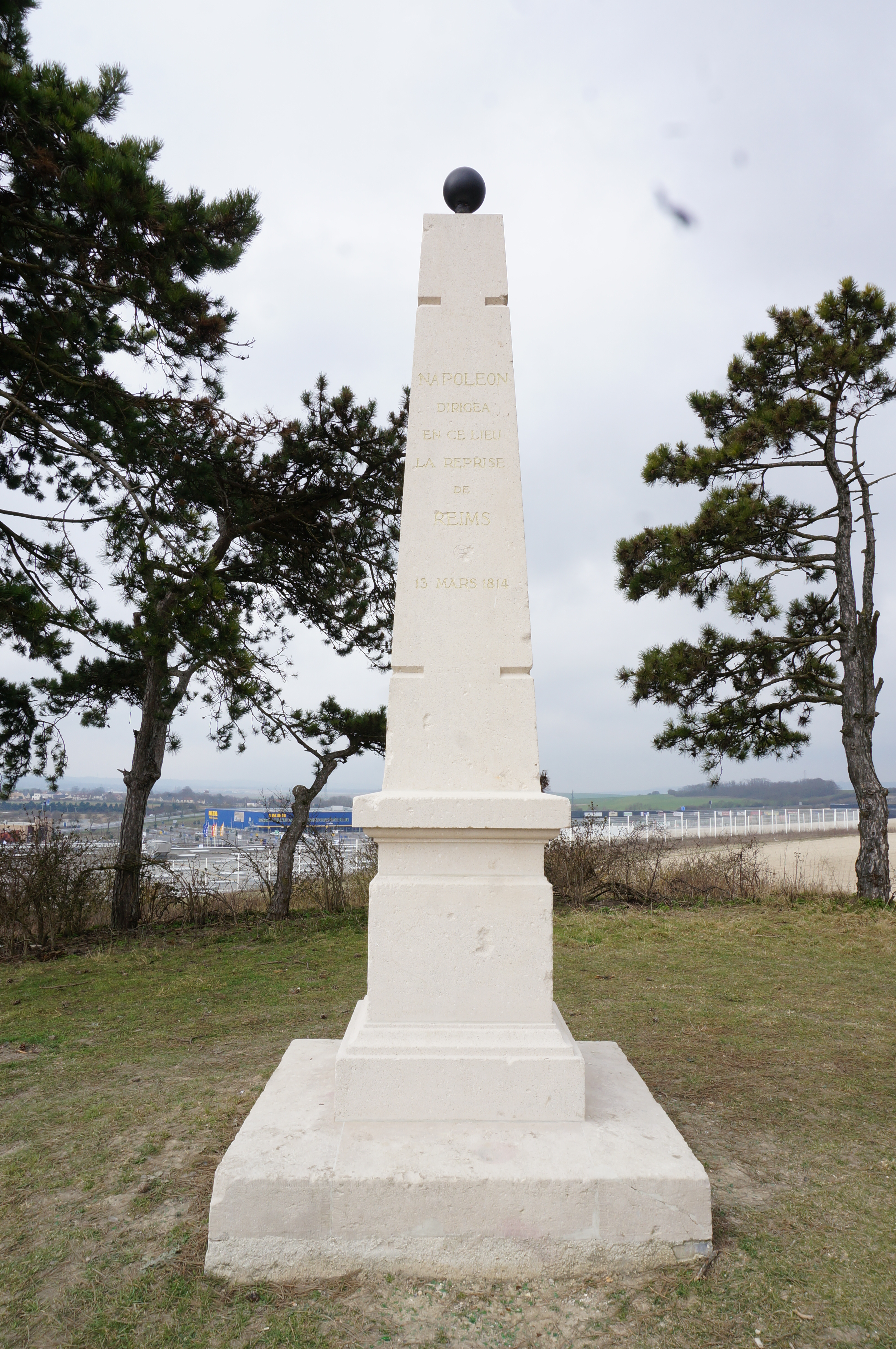 mémorial du point de commandement français de la bataille de Reims.